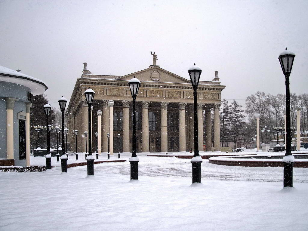 Драмтеатр